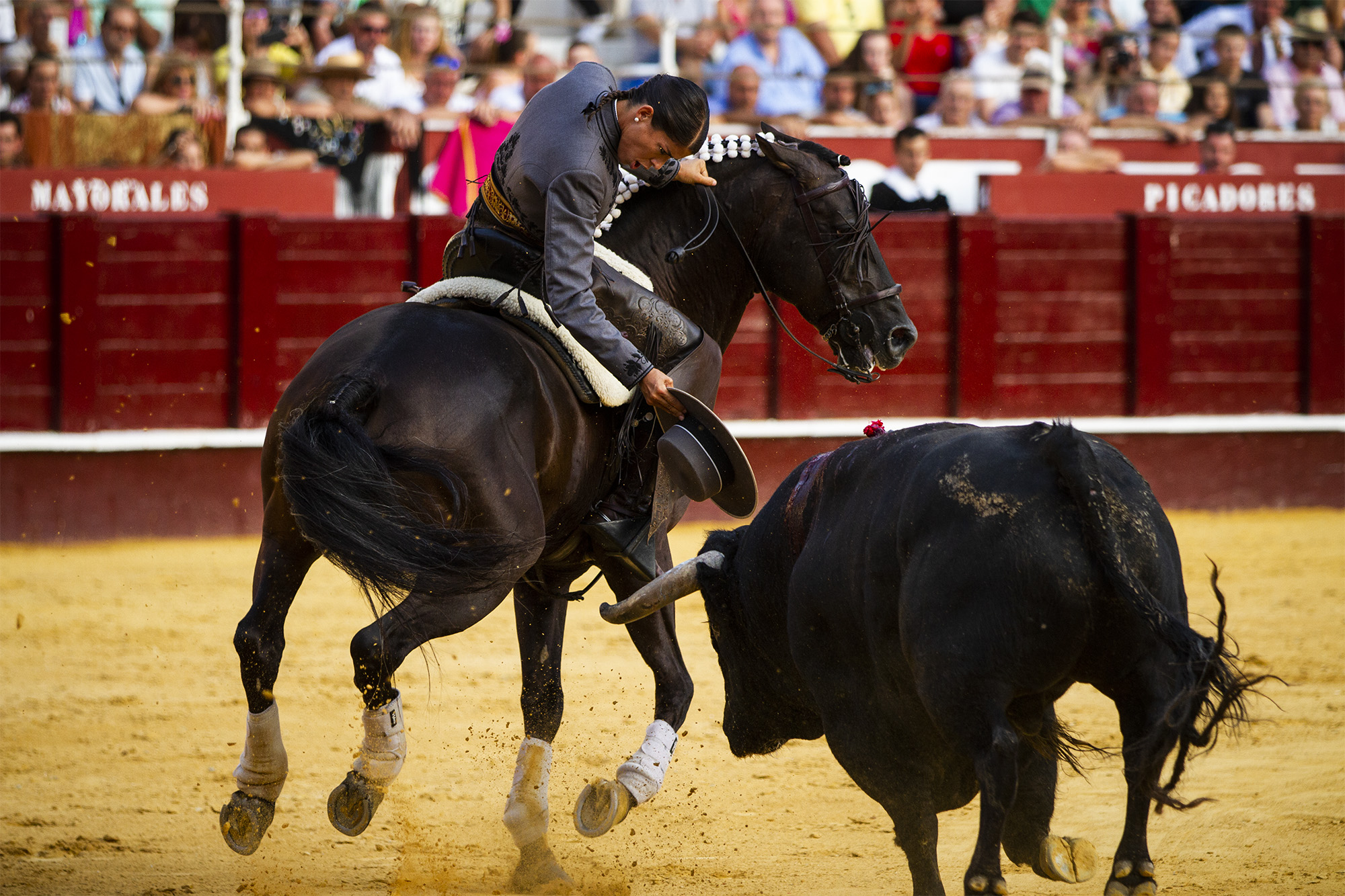 Lea Vicens templando a un toro en una de sus actuaciones